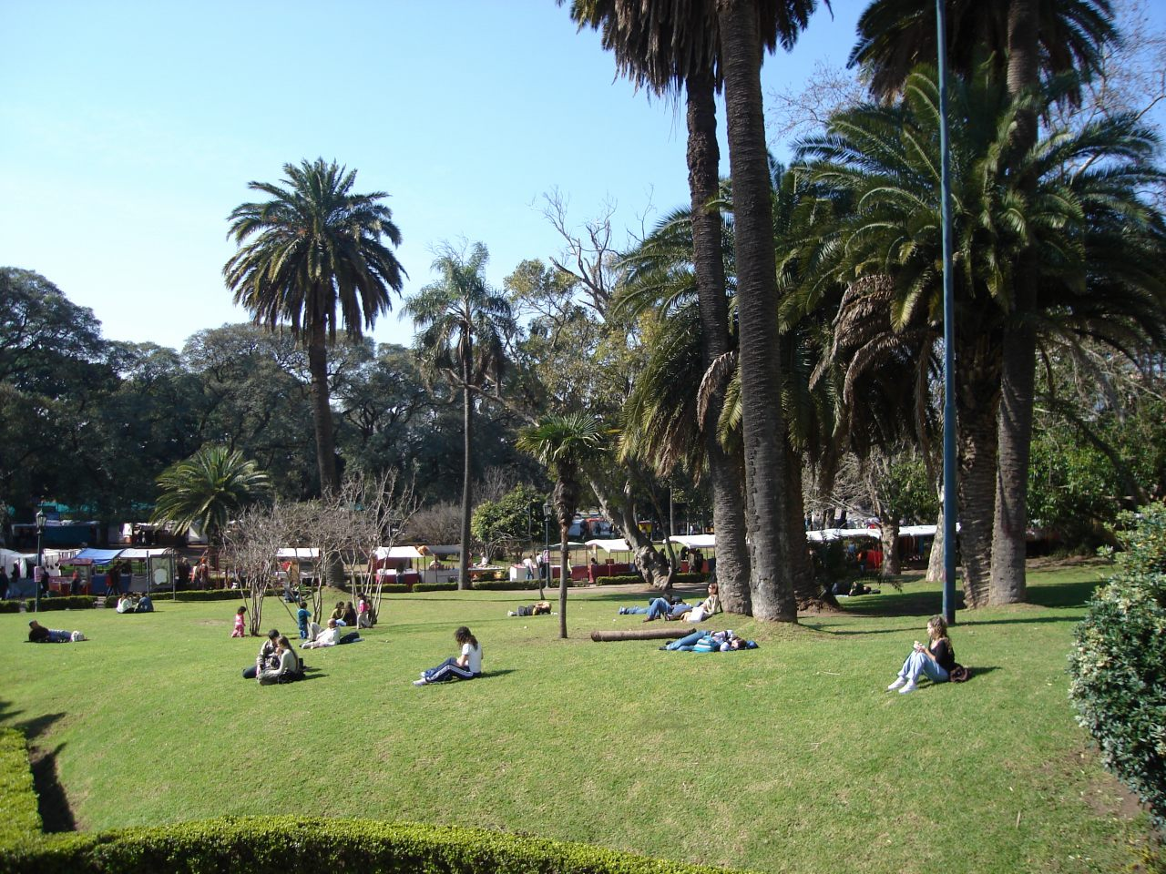 Vista general del sector norte de la Plaza Intendente Alvear, conocida erróneamente como Plaza Francia, sede de una de las mayores ferias artesanales de la Ciudad de Buenos Aires.